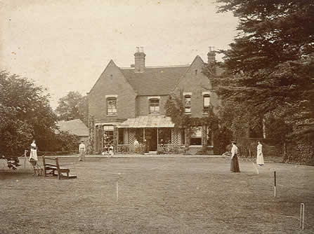 Особняк священника в Борли